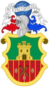 Escudo de Armas de Juan Sebastian Elcano concedido por Carlos I de España y V de Alemania